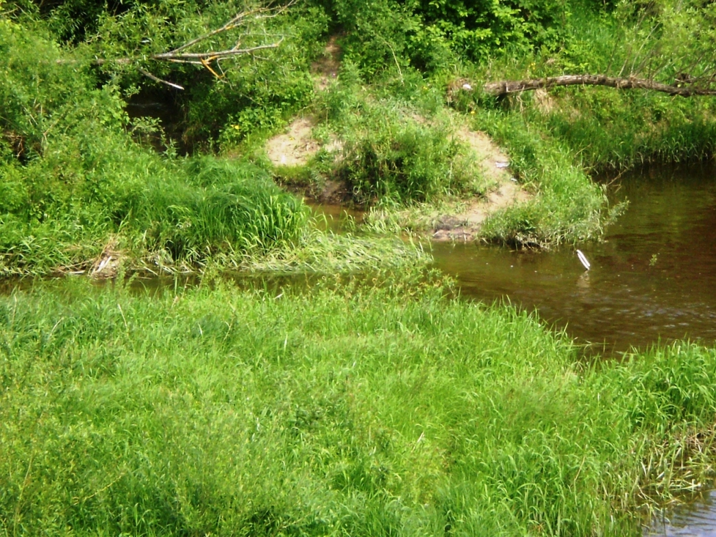 Palono santaka su Dubysa